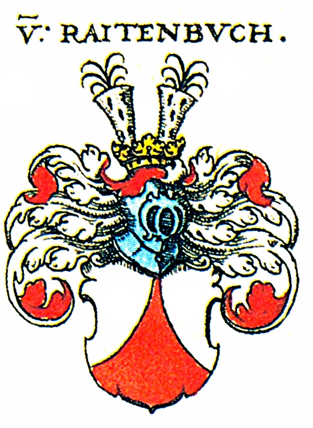 Wappen der Bayerischen Adelsfamilie Raitenbuch